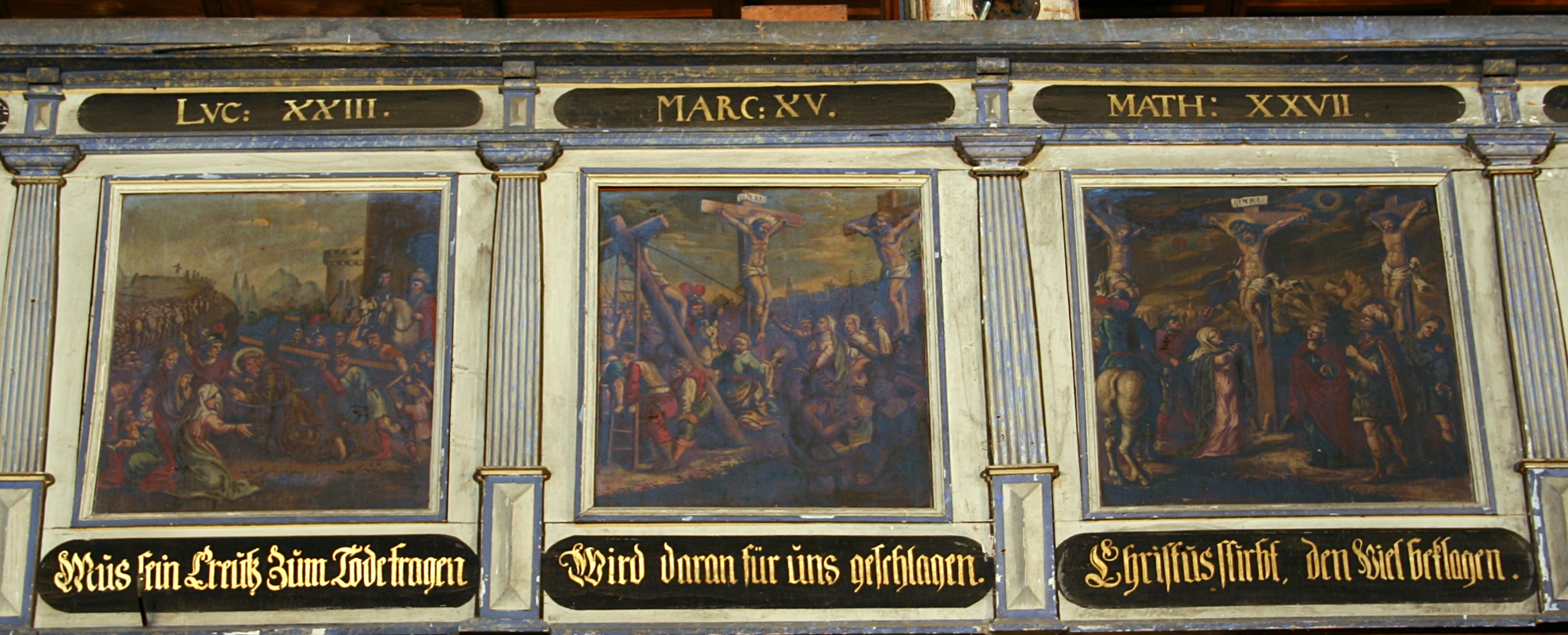 Obrazy stacji krzyżowych w Kościele Pokoju w Jaworze (zabytek nr A/1905/990 z 4.09.1963)